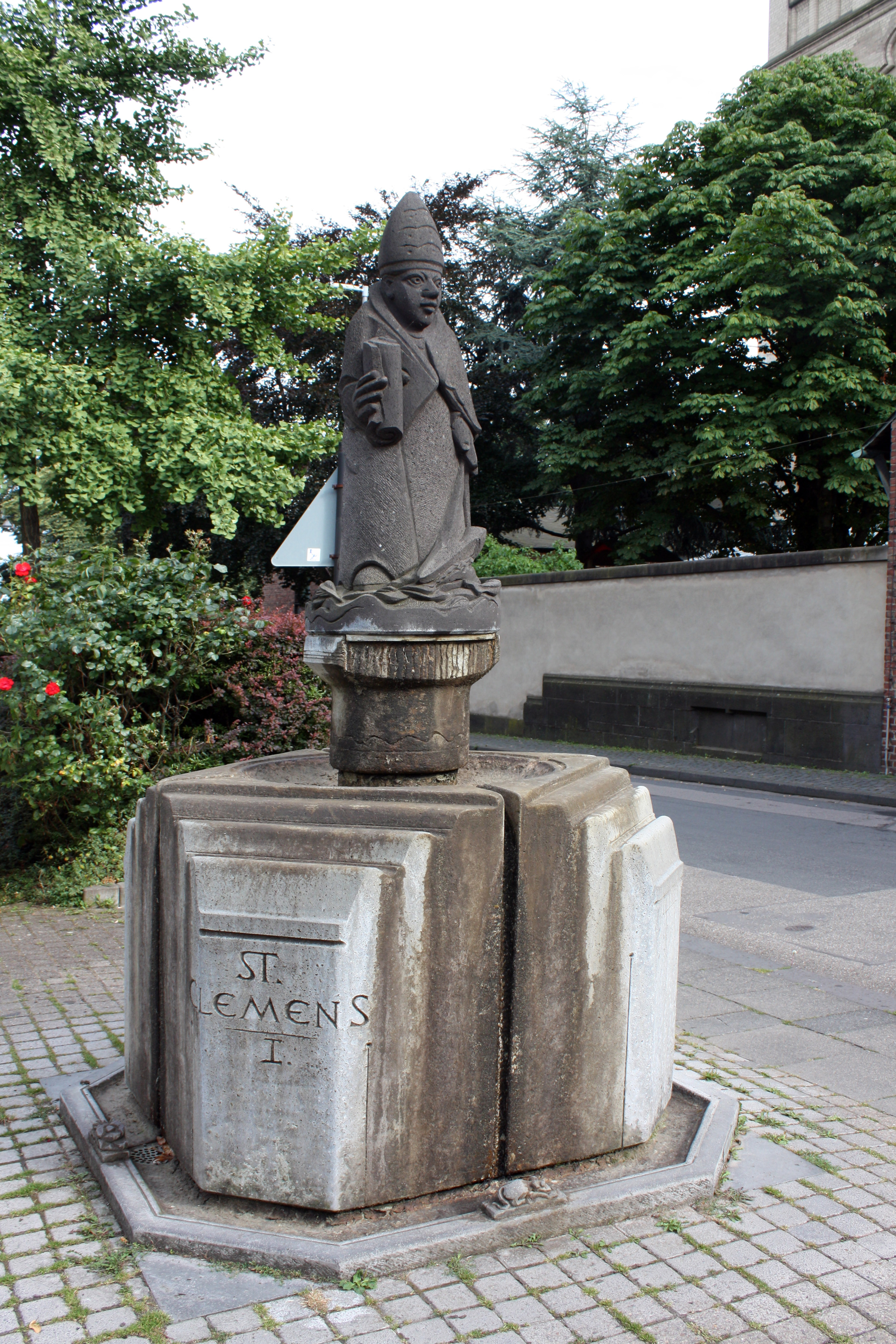 St. Clemens Brunnen. Der Clemens von Rom gewidmete Brunnen steht am Rand der Kunibertsklostergasse, zwischen dem Kölner „Marien Hospital“ und der Kirche St. Kunibert